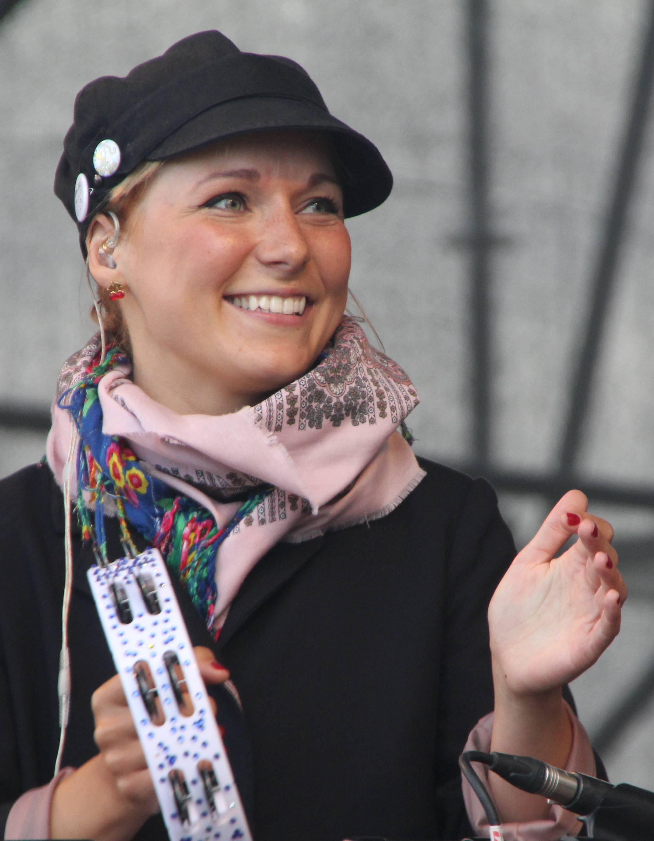 Lenna Kuurmaa Tallinna Merepäevadel